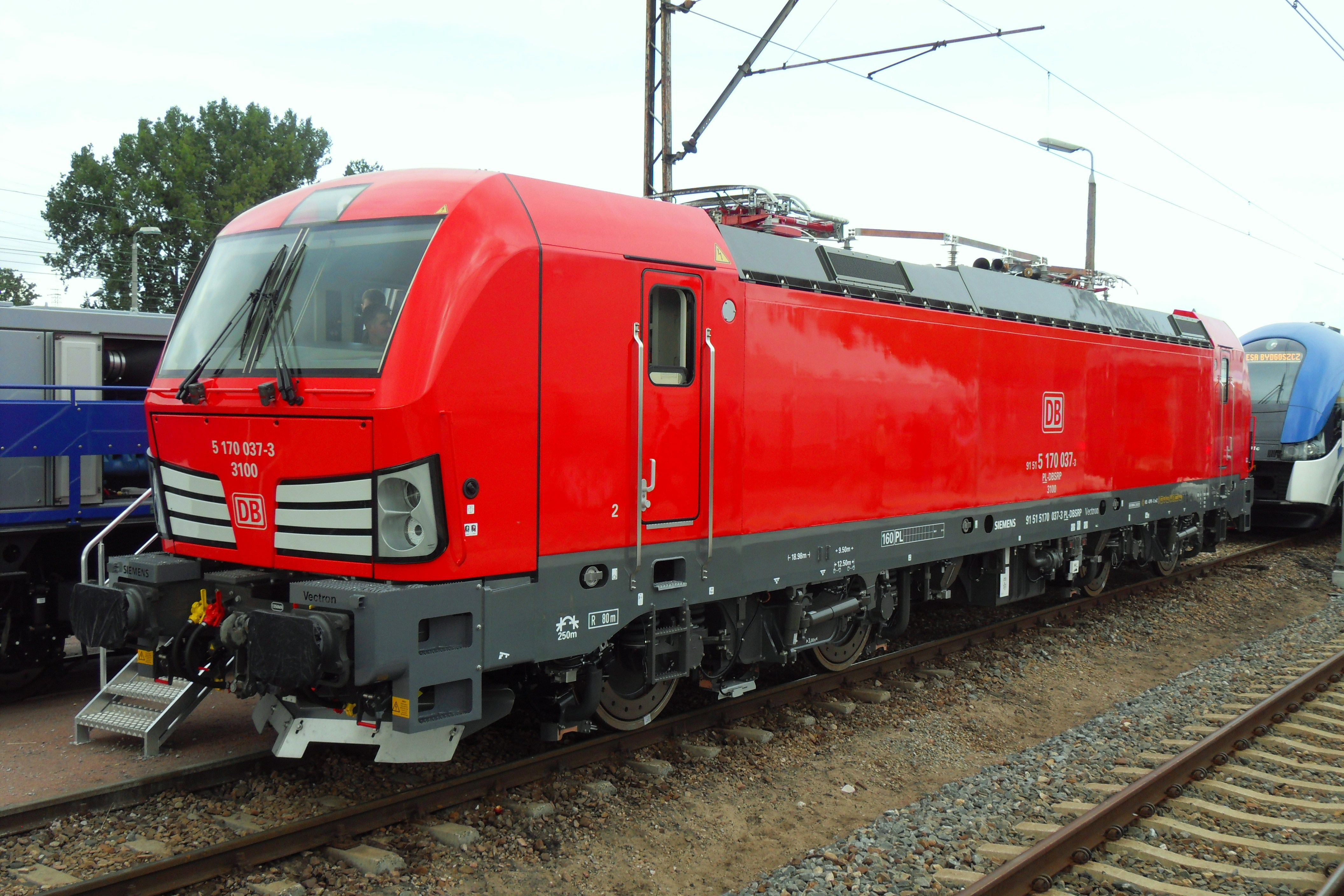 Lokomotywa elektryczna Vectron w malowaniu przewoźnika DB Cargo Polska na Międzynarodowych Targach Kolejowych Trako 2013 w Gdańsku.